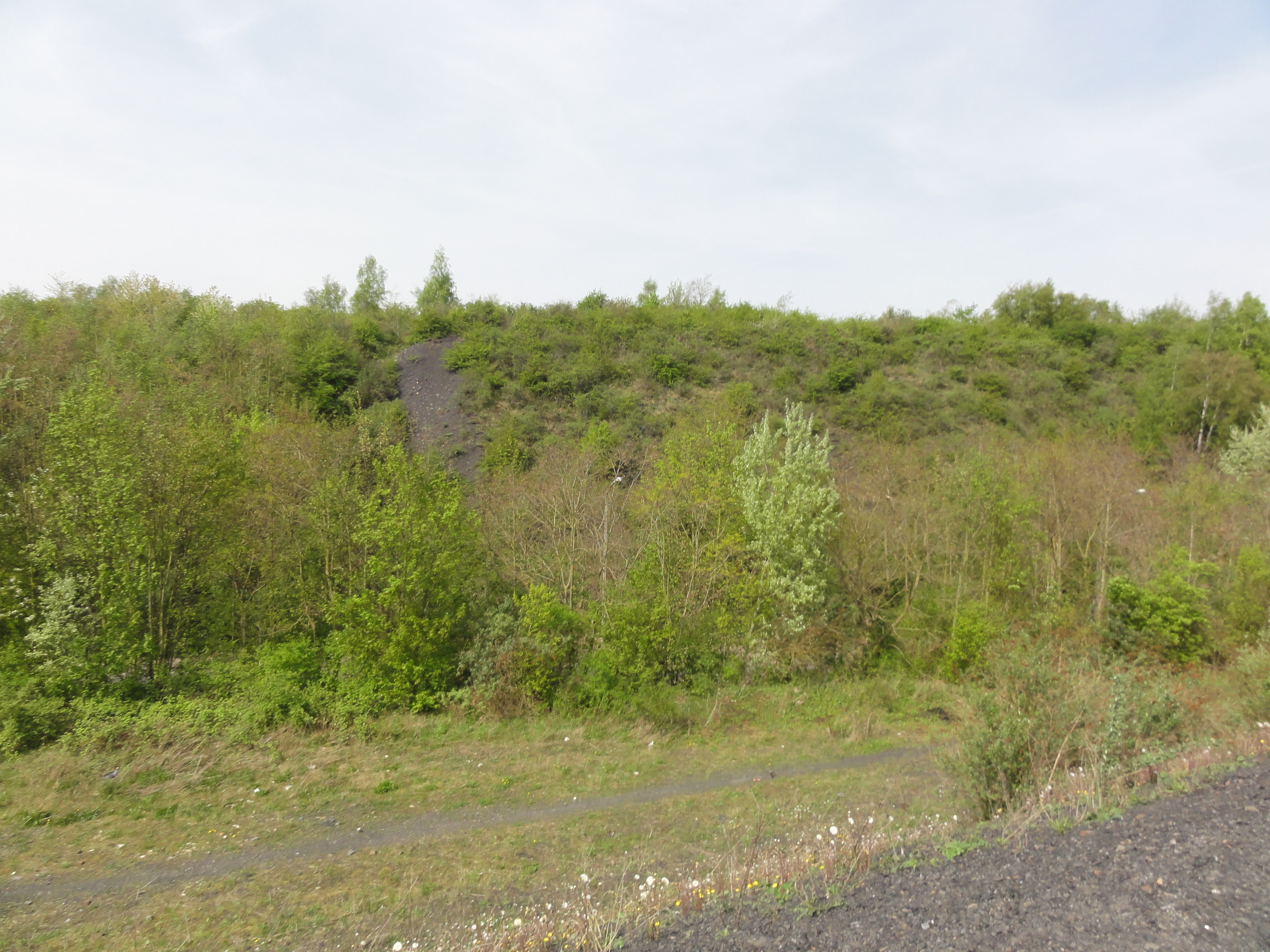 Terril n° 89 dit 3 Est de Dourges, Fosse n° 3 et 3 bis de la Compagnie des mines de Dourges, Hénin-Beaumont, Pas-de-Calais, Nord-Pas-de-Calais, France.